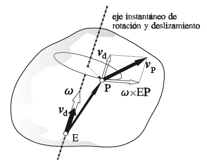 Cinemática del Sólido Rígido.jpg